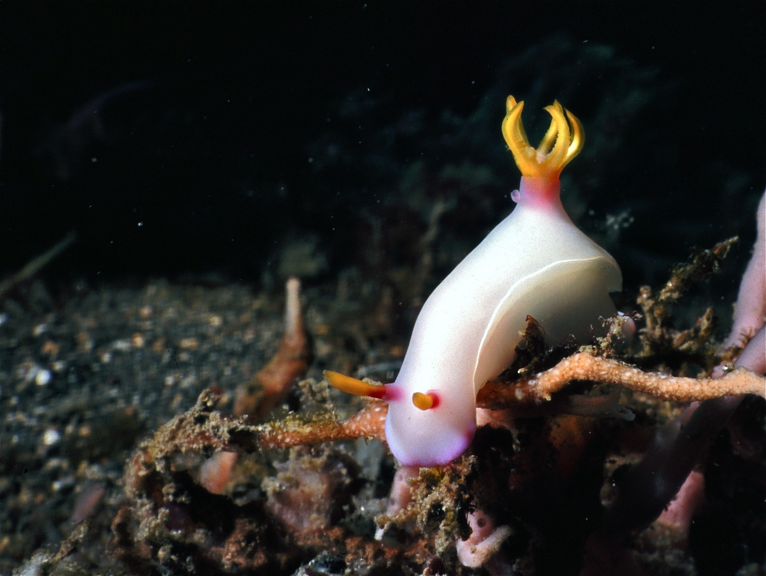 Lembeh Strait, Sulawesi, INDONESIA